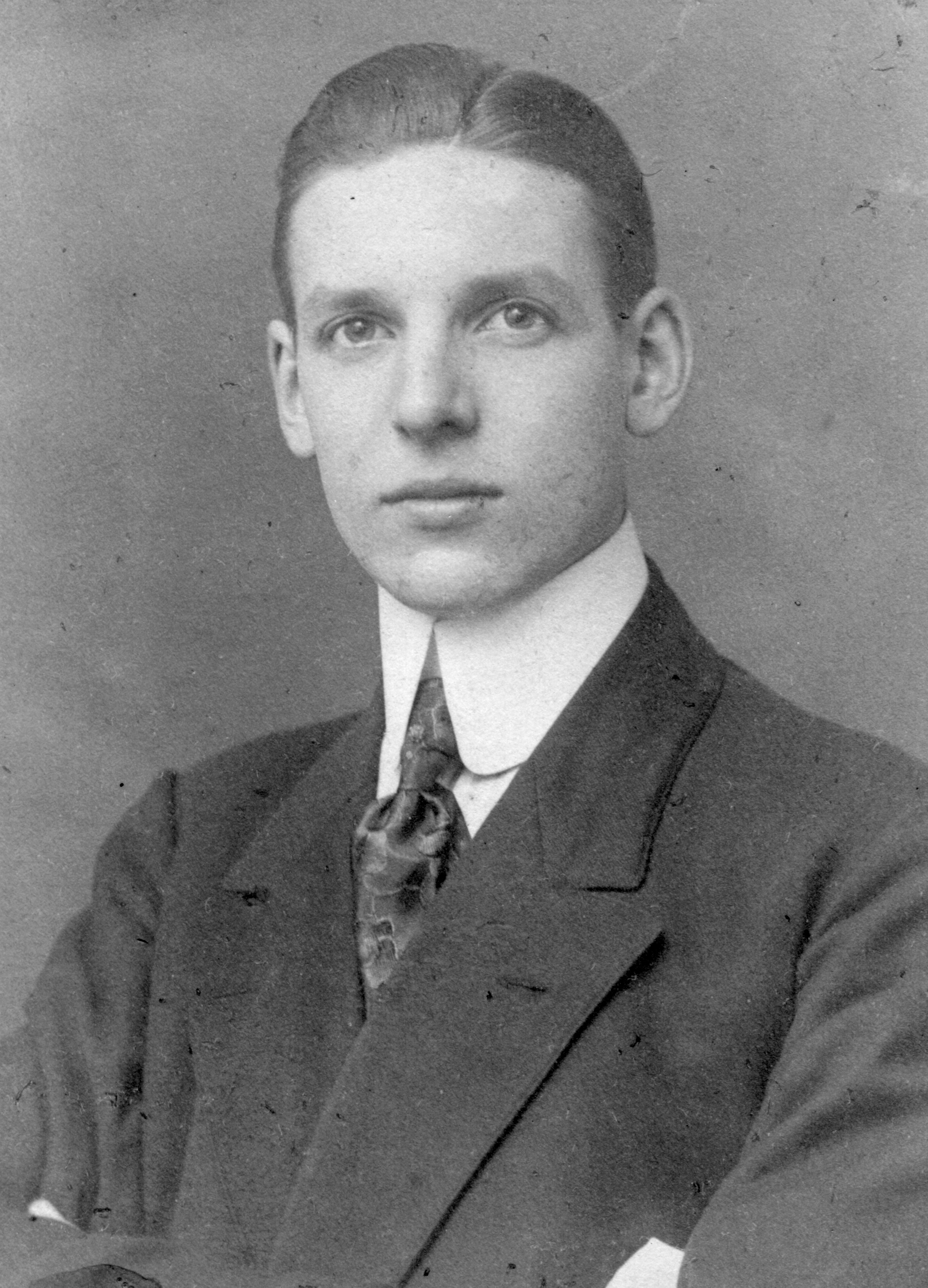 Foto von Georg Beck